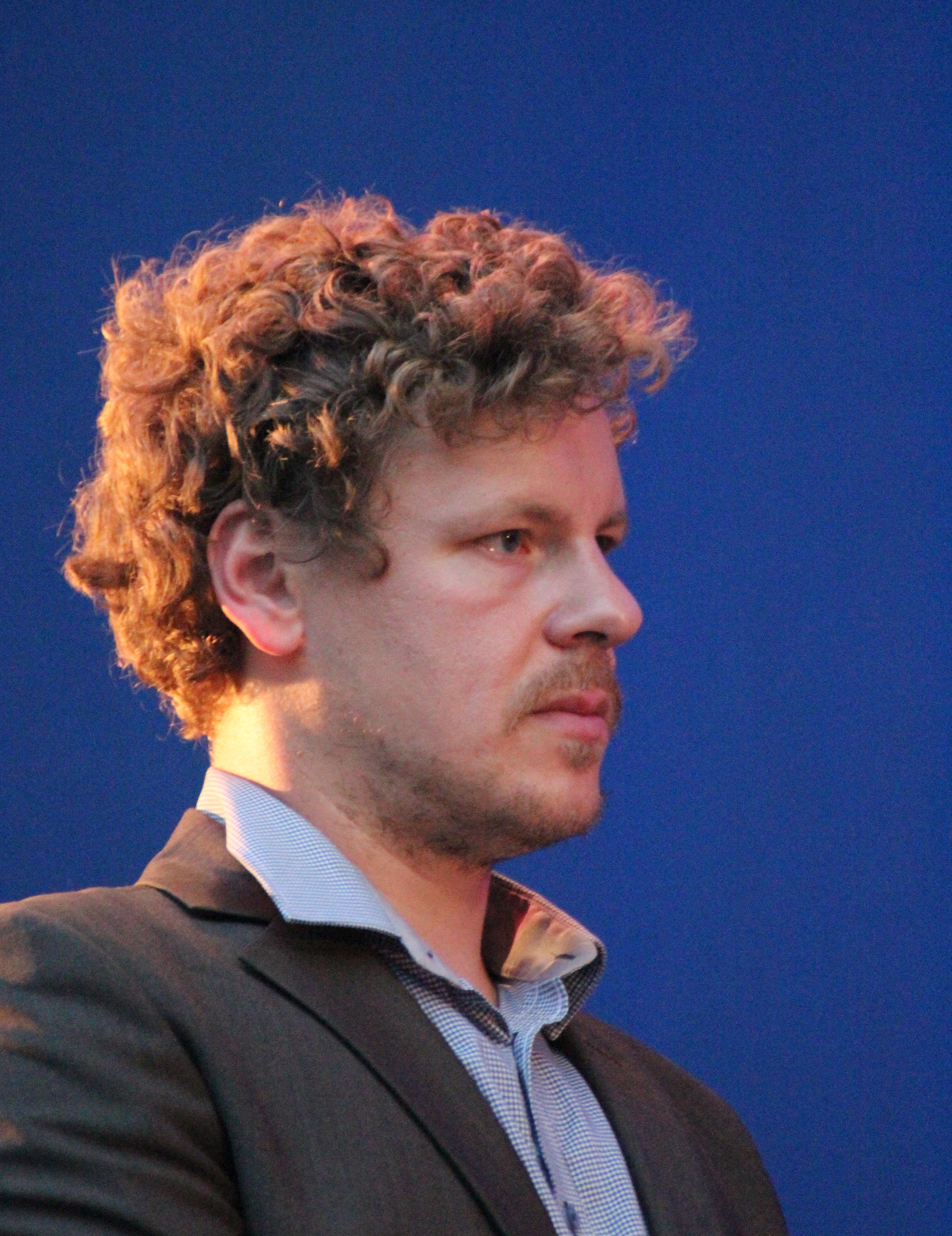 Bildinhalt: Bastian Stein bei einem Auftritt im Frankfurter Palmengarten Aufnahmeort: Frankfurt am Main, Deutschland Die dargestellte Person wurde bei einem öffentlichen Auftritt fotografiert.